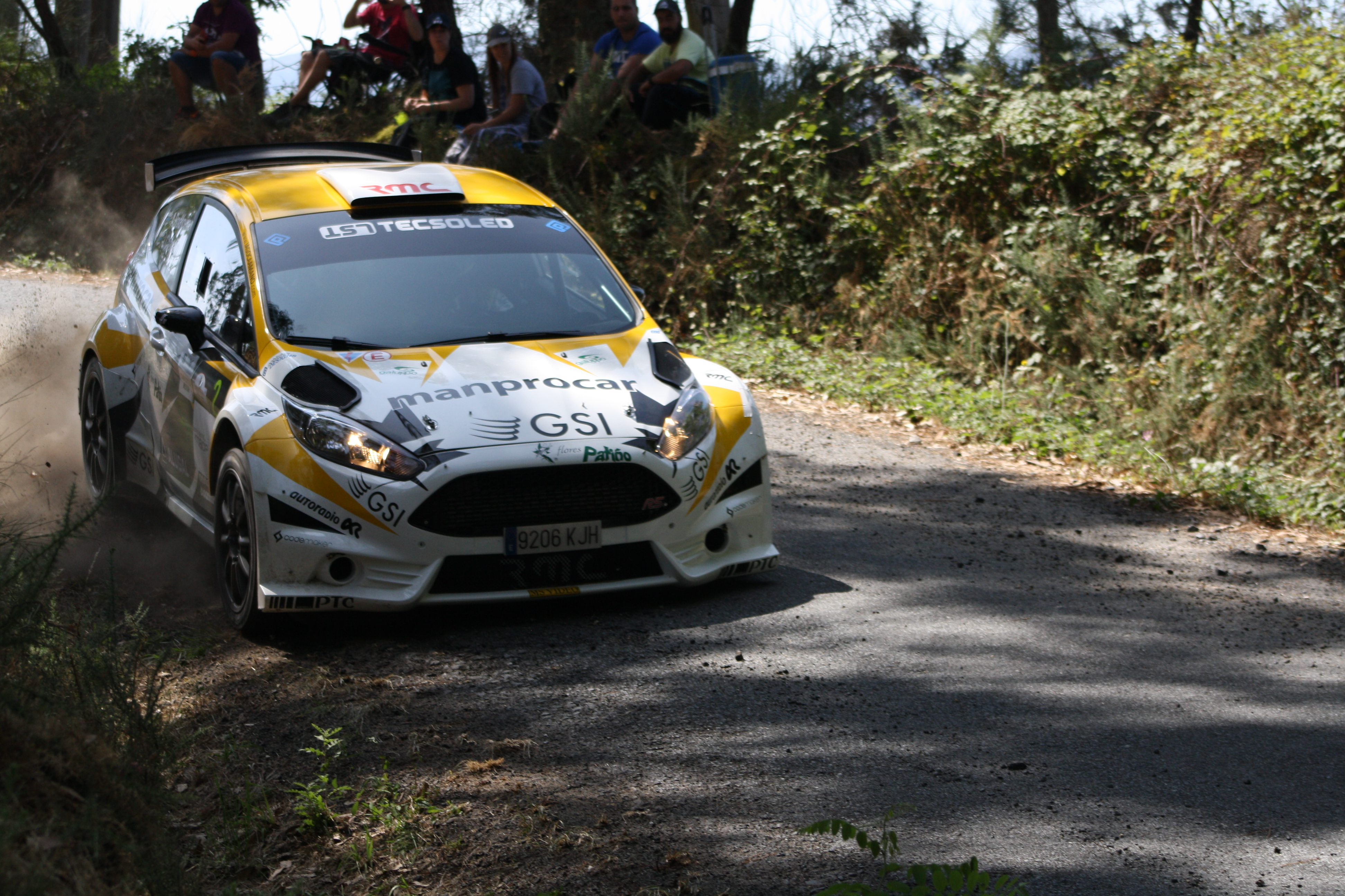 Rally Botafumeiro 2018. Tramo de Sarandón.